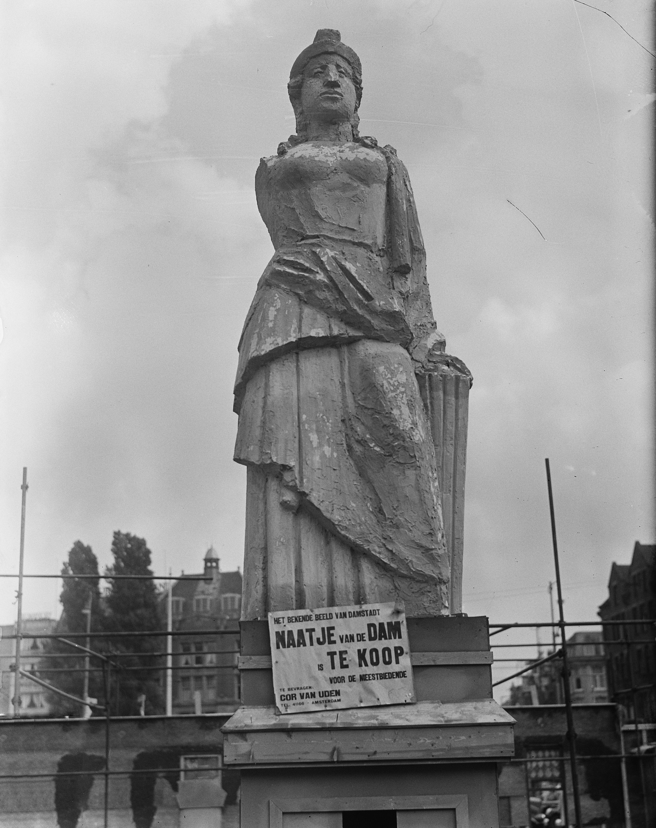 Collectie / Archief : Fotocollectie Anefo Reportage / Serie : [ onbekend ] Beschrijving : "Naatje" op de Dam te koop Datum : 3 augustus 1950 Locatie : Amsterdam, Noord-Holland Trefwoorden : beeldhouwkunst, standbeelden Fotograaf : Noske, J.D. / Anefo Auteursrechthebbende : Nationaal Archief Materiaalsoort : Glasnegatief Nummer archiefinventaris : bekijk toegang 2.24.01.09 Bestanddeelnummer : 904-1086